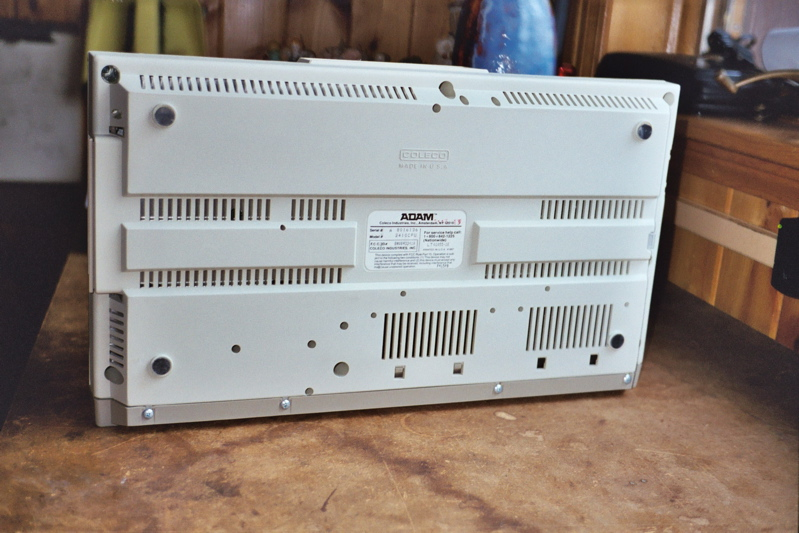 Coleco ADAM main unit underside